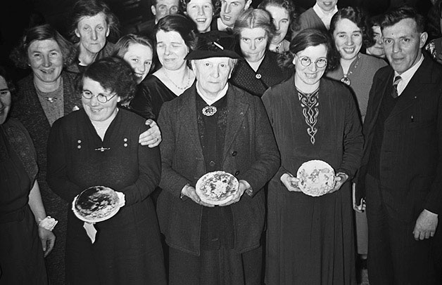 Teitl Cymraeg/Welsh title:Dawns Flynyddol Dydd Mawrth Crempog Trewern Ffotograffydd/Photographer: Geoff Charles (1909-2002) Dyddiad/Date: February 10, 1940. Cyfrwng/Medium: Negydd ffilm / Film negative Cyfeiriad/Reference: (gcc01562) Rhif cofnod / Record no.: 3472229 Rhagor o wybodaeth am gasgliad Geoff Charles yn Llyfrgell Genedlaethol Cymru More information about the Geoff Charles Collection at the National Library of Wales Mae ffotograffau Geoff Charles hefyd yn rhan o Broject Europeana Libraries Geoff Charles' photographs also form part of the Europeana Libraries Project